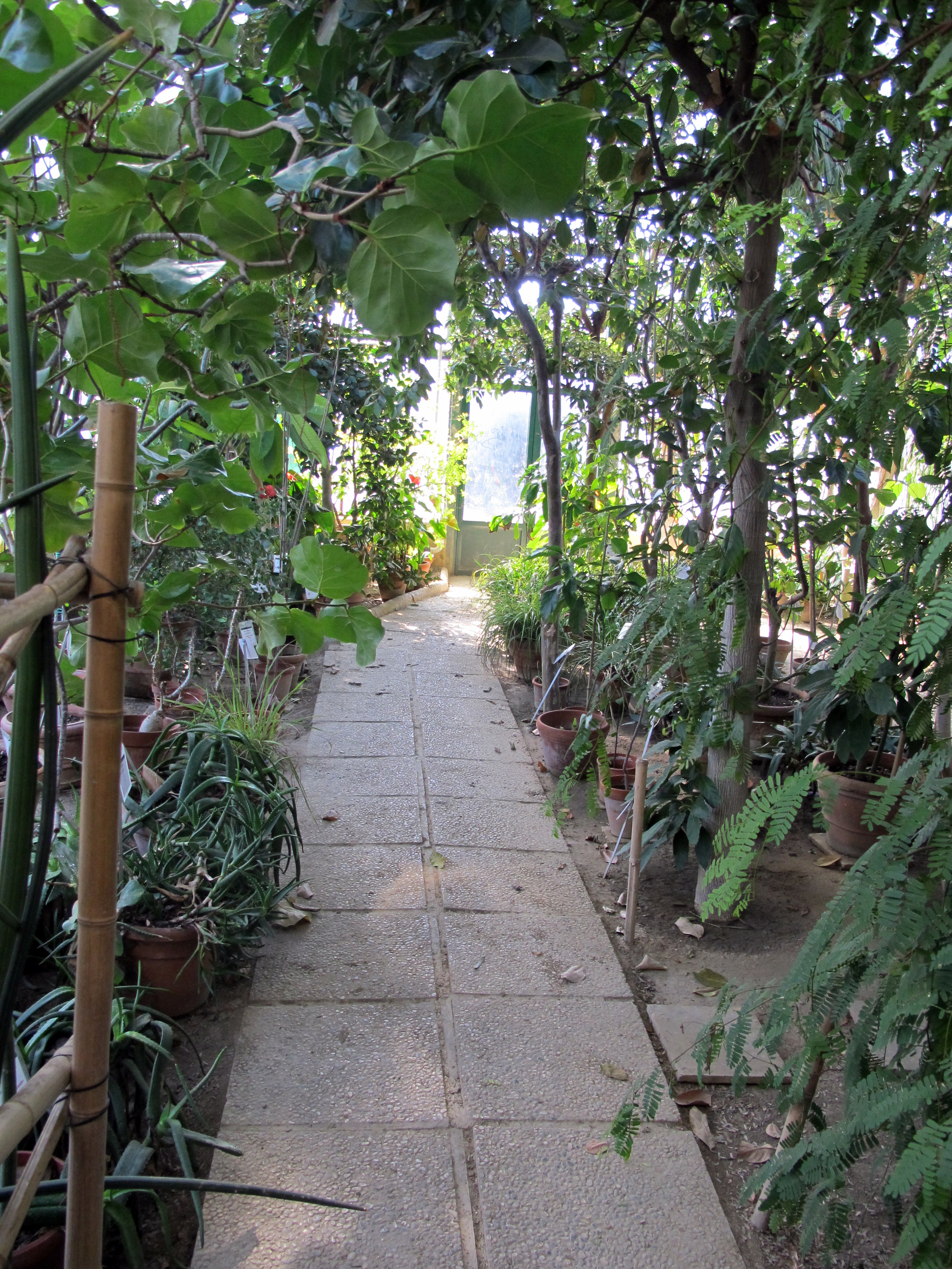 Istituto agronomico per l'oltremare, serre